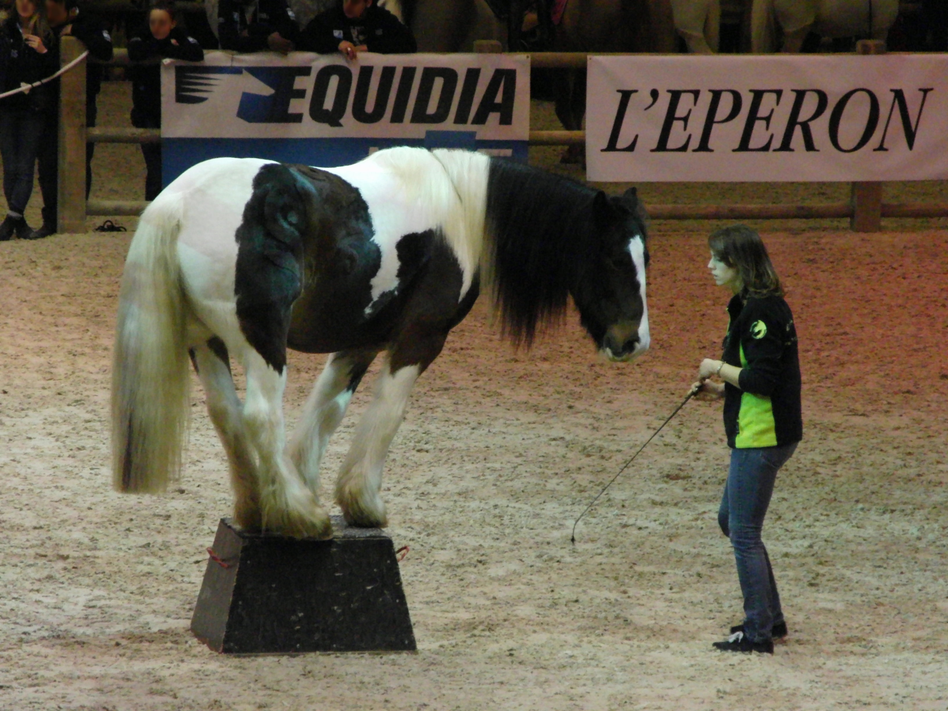 Irish cob - Salon du cheval de Paris 2013, Parc des expositions de Paris-Nord Villepinte, France